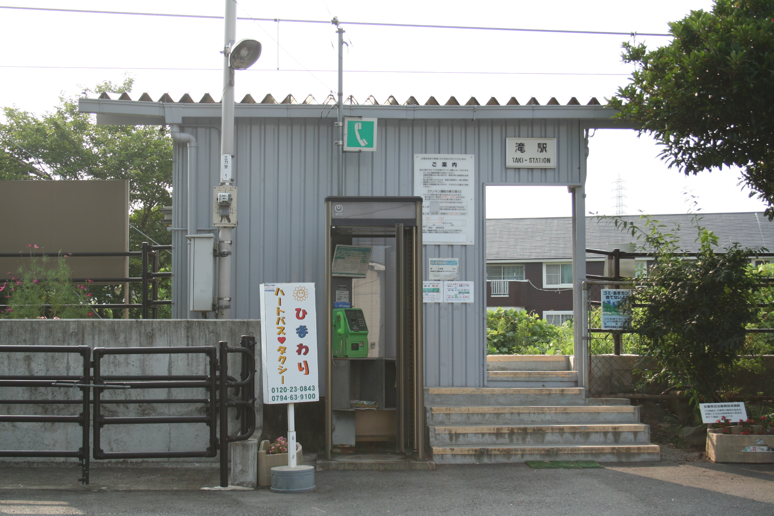 滝駅。JR西日本加古川線の鉄道駅。 滝駅駅舎。